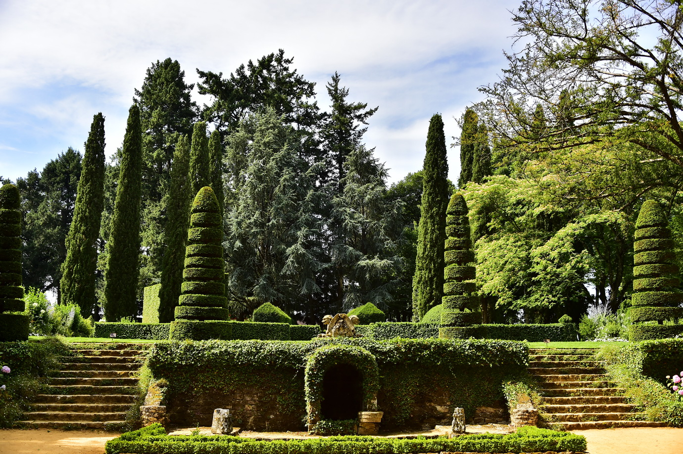 Jardins du Manoir d'Eyrignac, Perigord